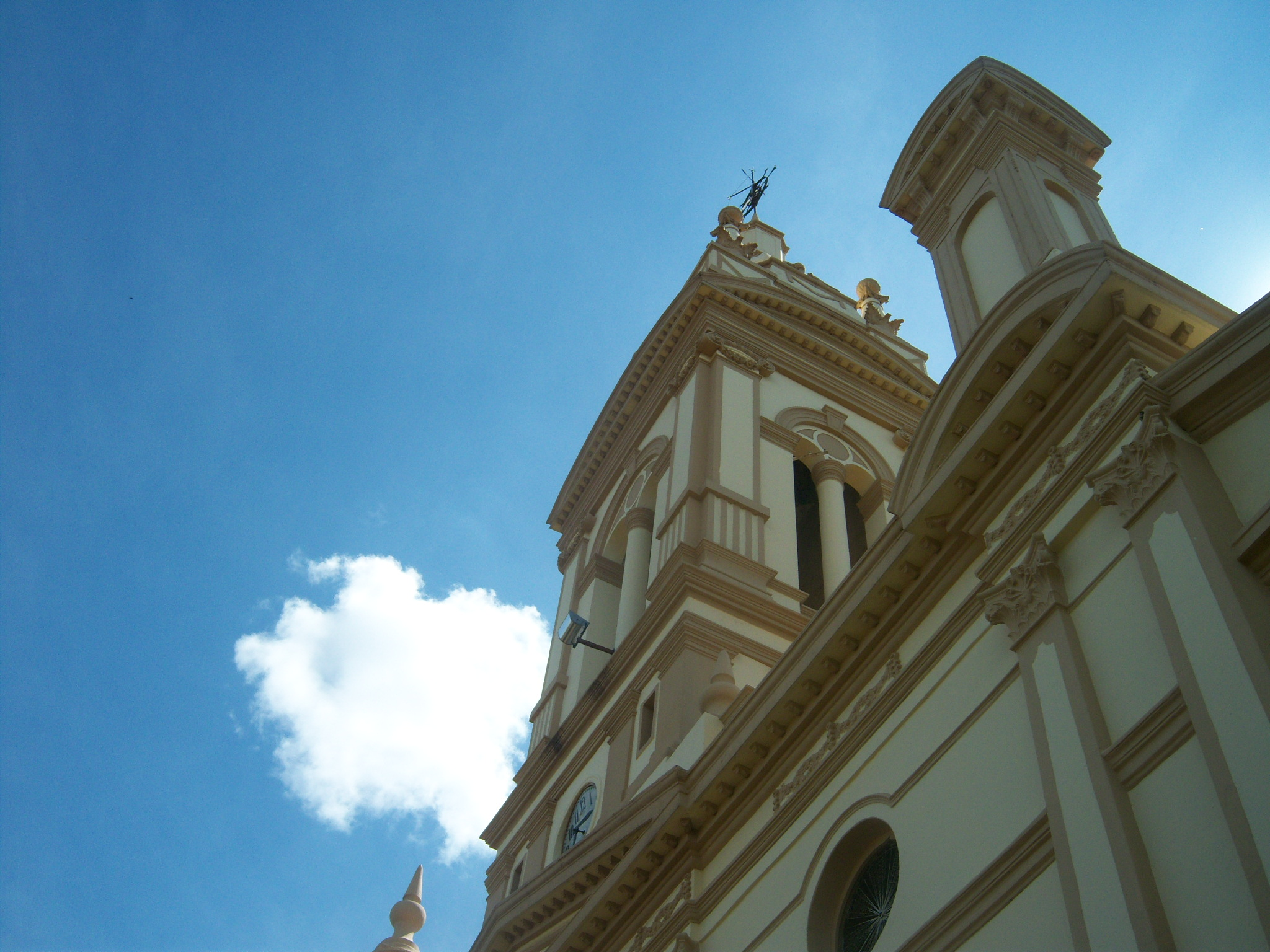 Iglesia Catedral de la ciudad de Itauguá, Central, Paraguay.